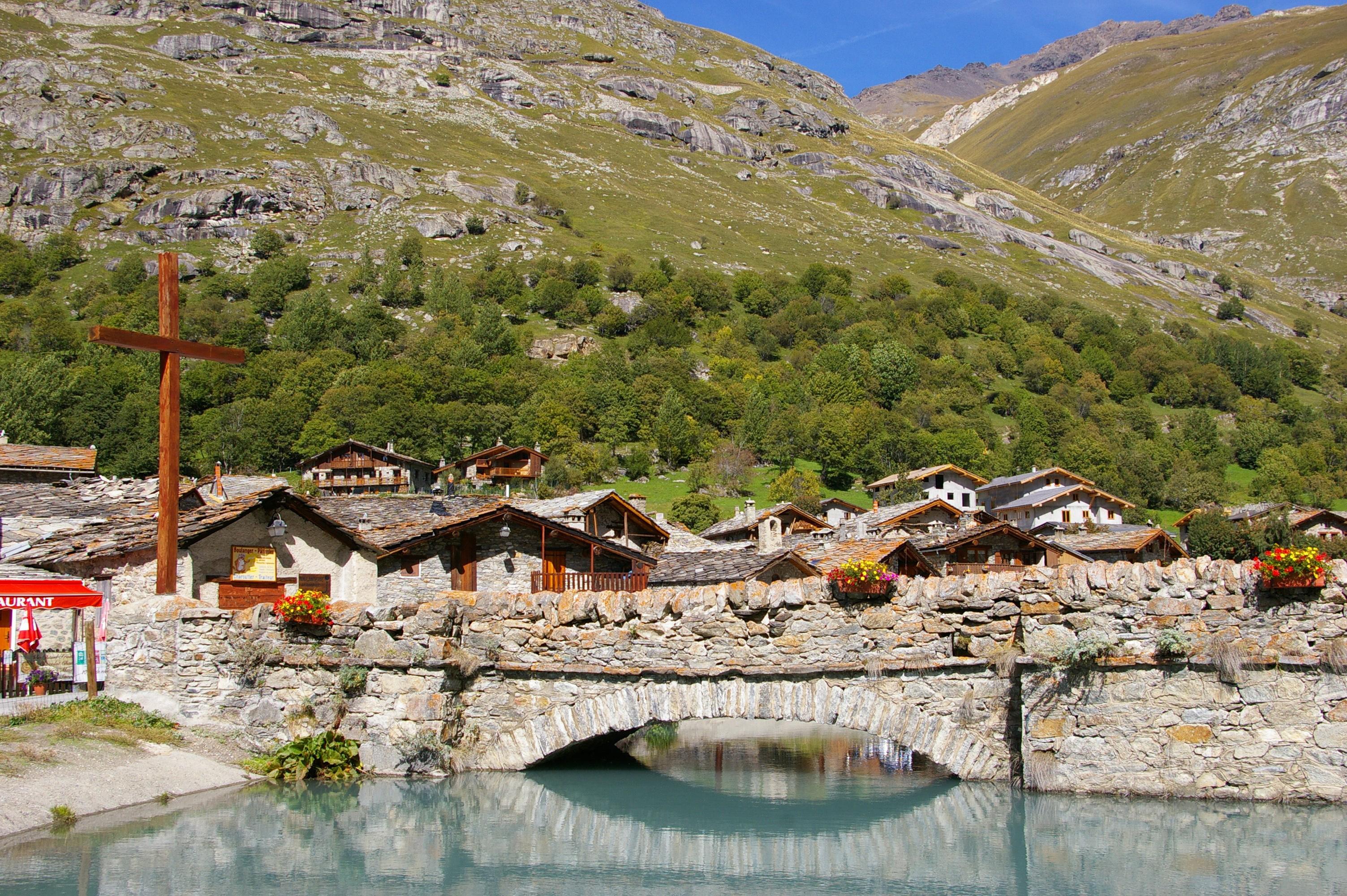 village classé parmi les plus beaux villages de France, le seul en Savoie